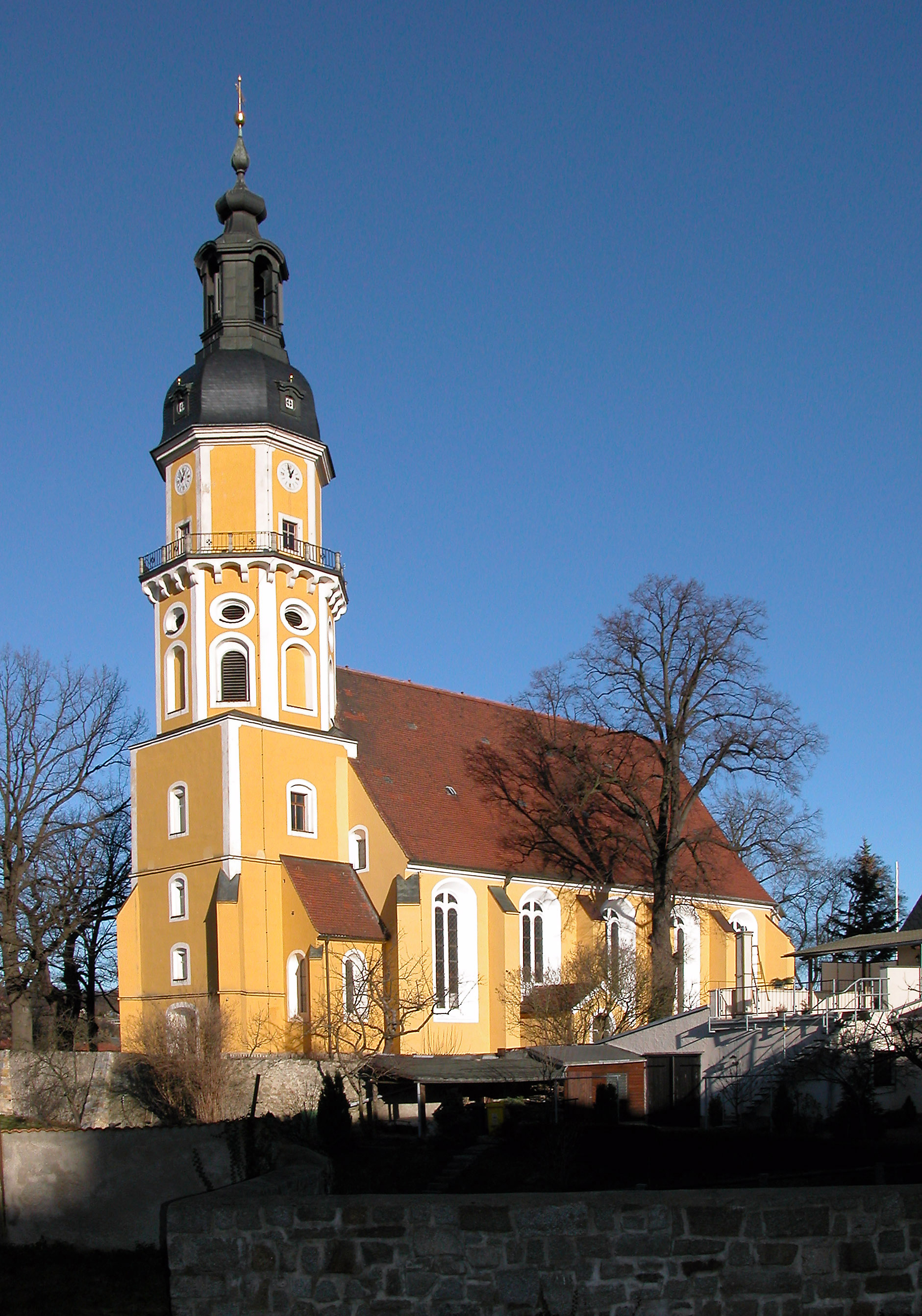 08.01.2005 01936 Königsbrück: Evangelisch-Lutherische Stadtkirche (GMP: 51.263811,13.900601). Erbaut wurde der Barockbau von 1682 bis 1689 unter Leitung von Christoph Gottschick und G. F. Spieß. [DSCN5734.TIF]20050108560DR.JPG(c)Blobelt